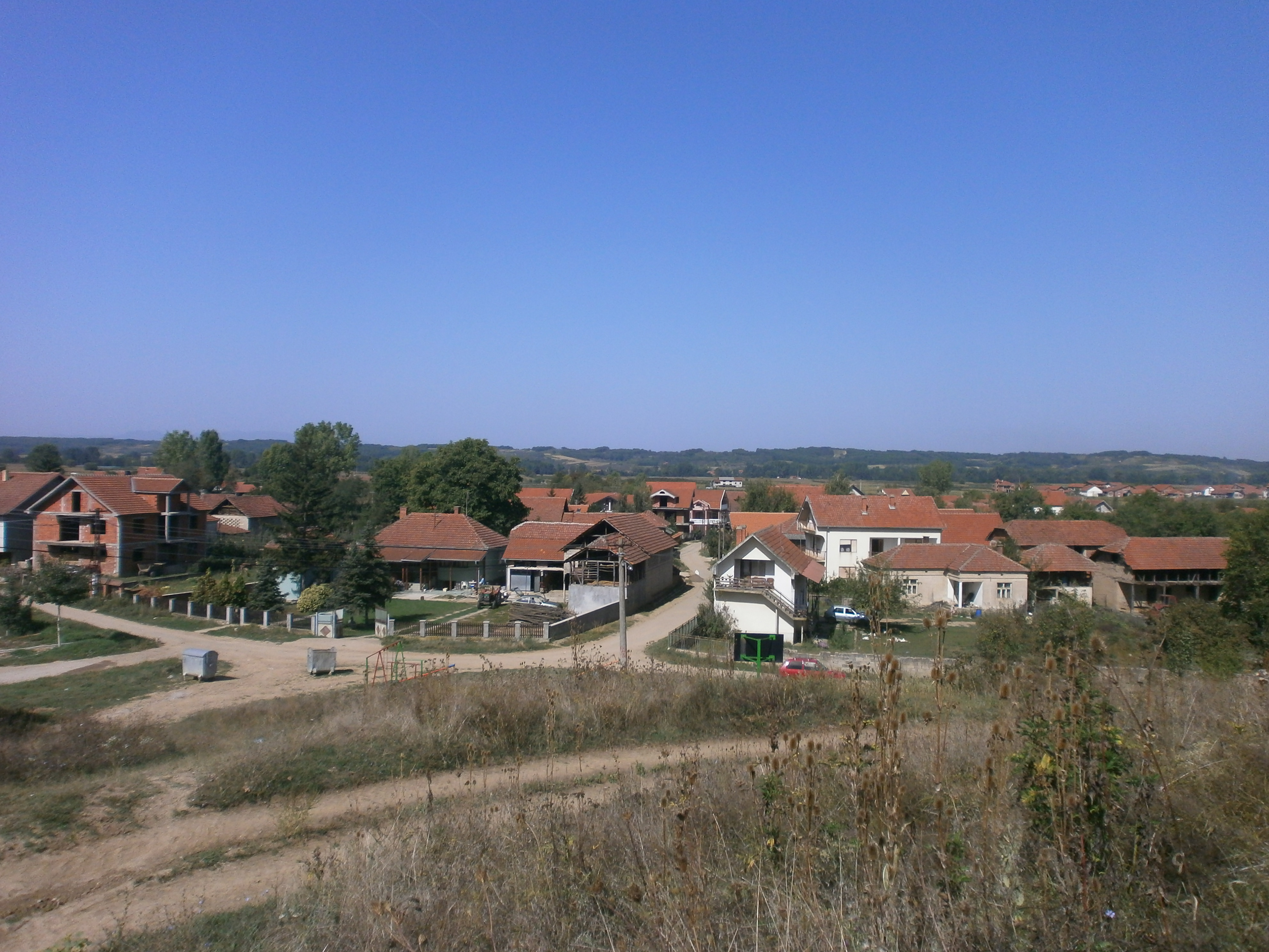 Srpski (latinica): Presečina, Leskovac